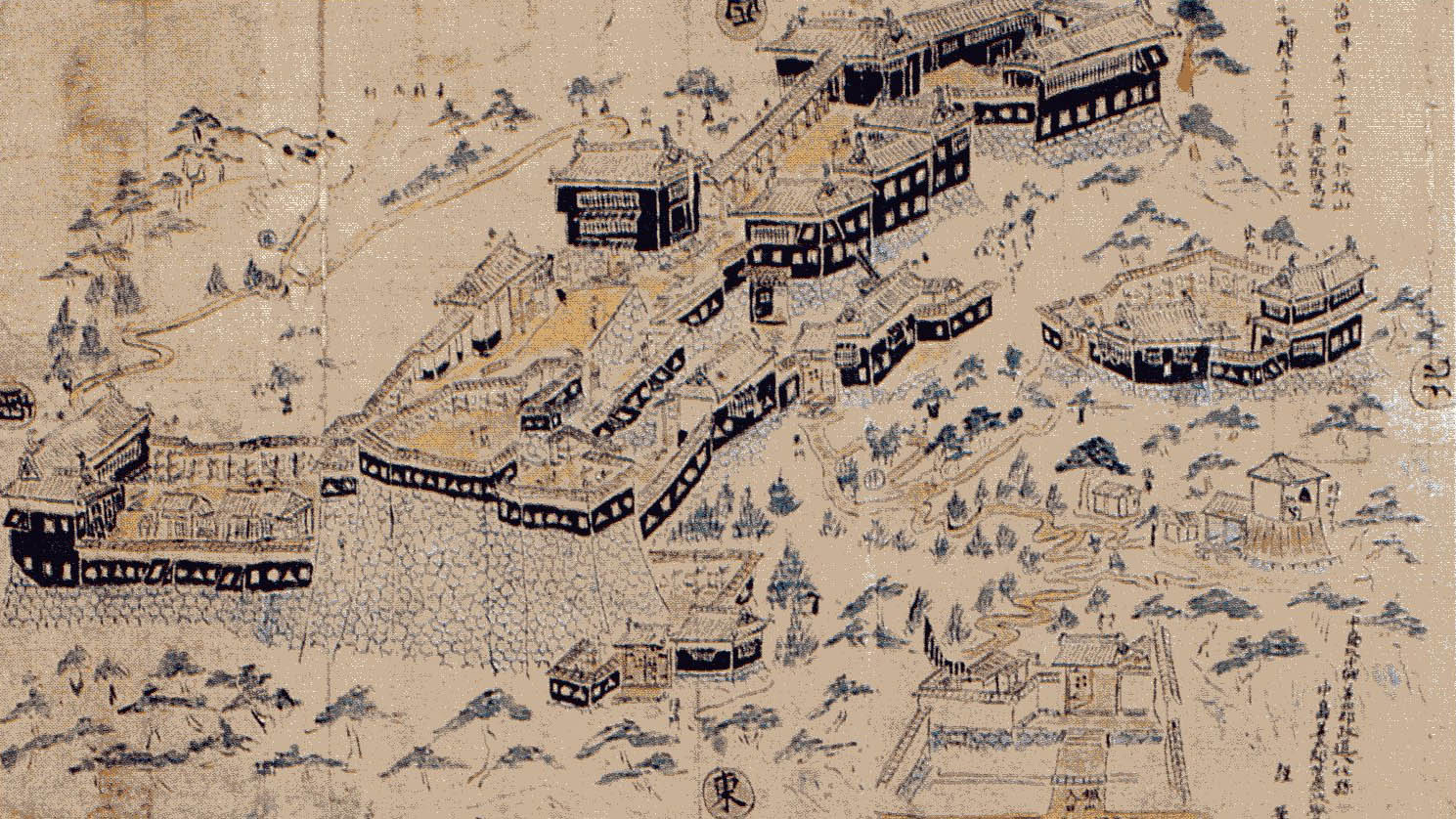 津和野町城図